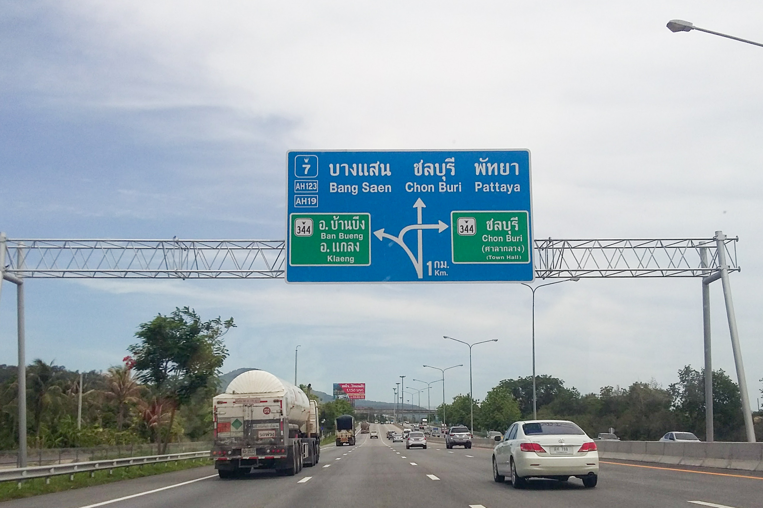 ทางแยกต่างระดับ ชลบุรี